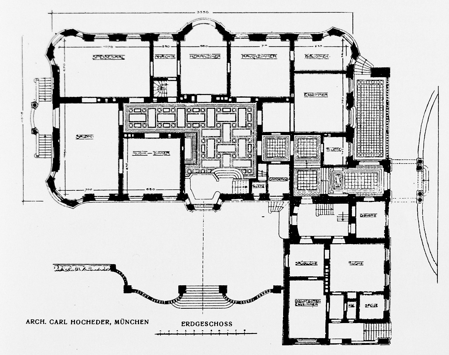 Grundriss Schloss Hirschberg.